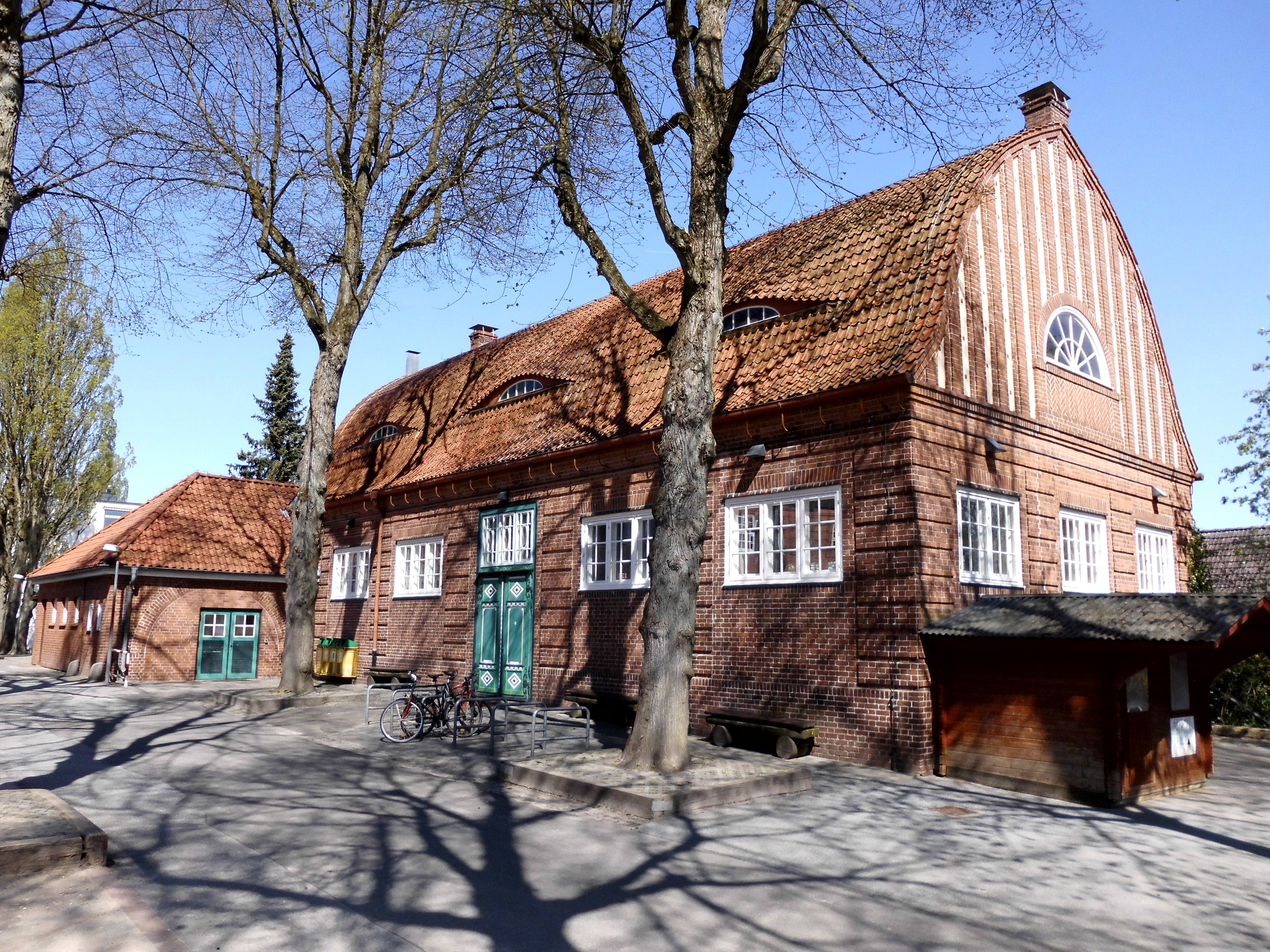 Die Turnhalle der Brüder-Grimm-Schule in Kronshagen bei Kiel.